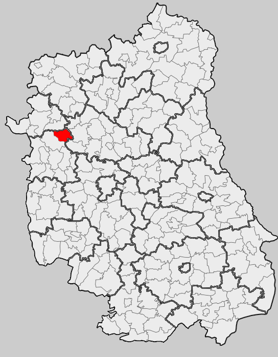 Map of gmina Baranów, Puławy county, Lublin voivodship Mapa gminy Baranów, powiat puławski, województwo lubelskie